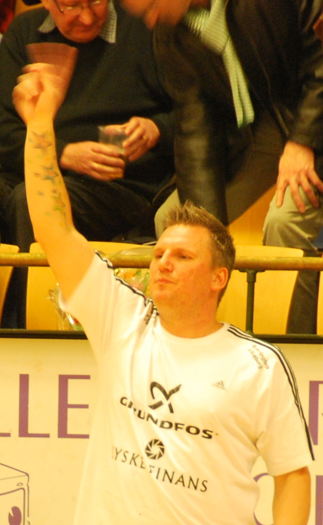 Håndboldspiller og træner Nikolaj Jacobsen.